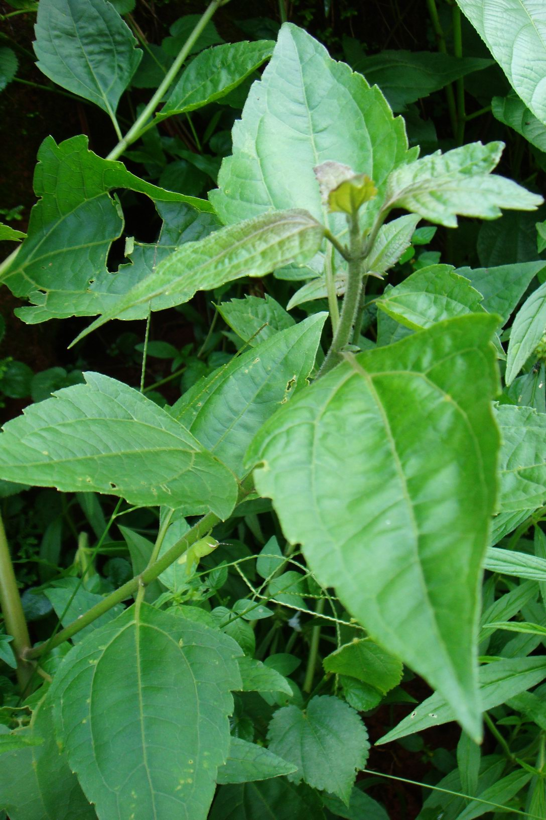 കമ്യൂണിസ്റ്റ് പച്ച